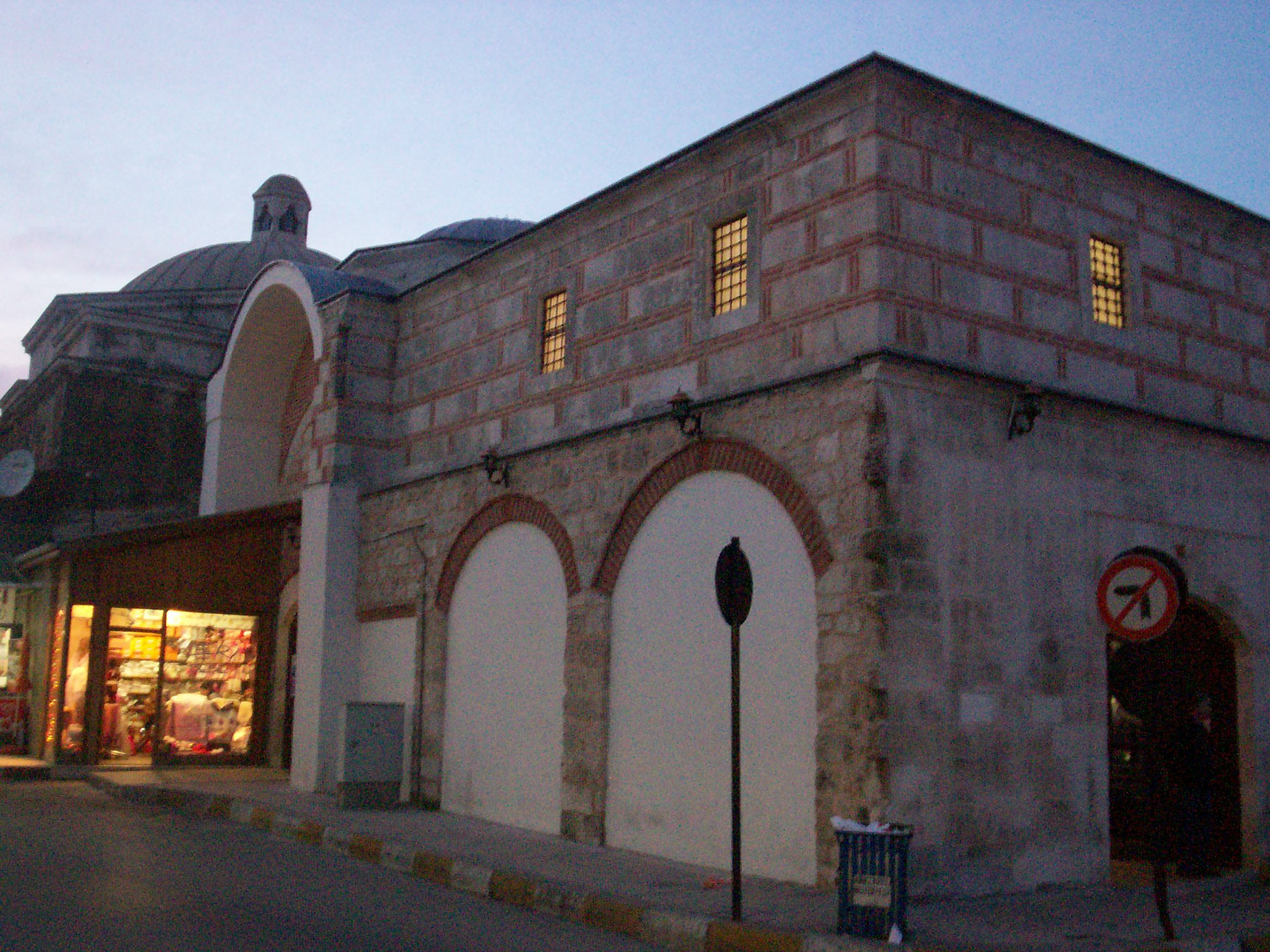 Kendi fotoğraf makinemle çektim.